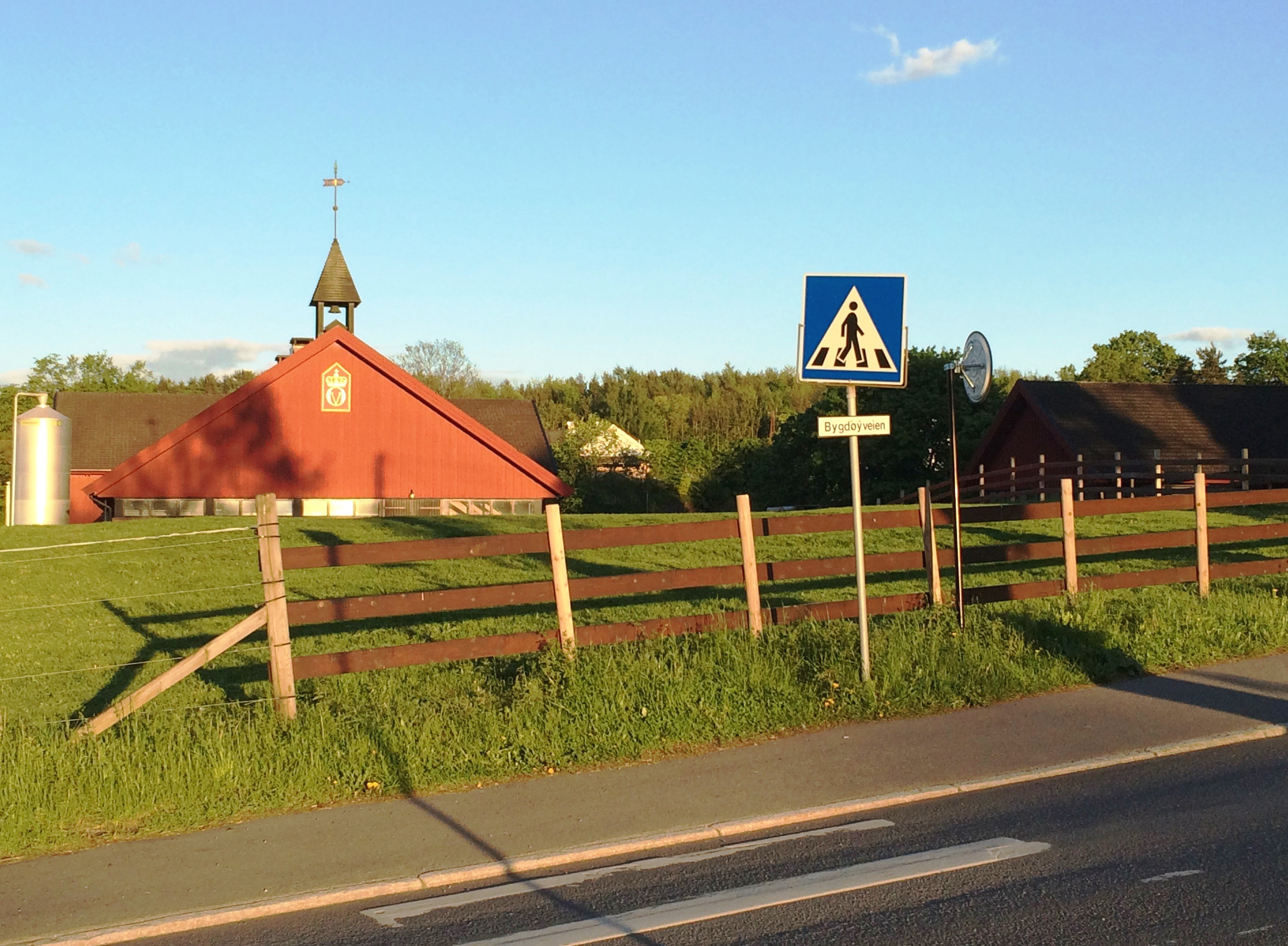 Bygdøyveien ved kongsgården